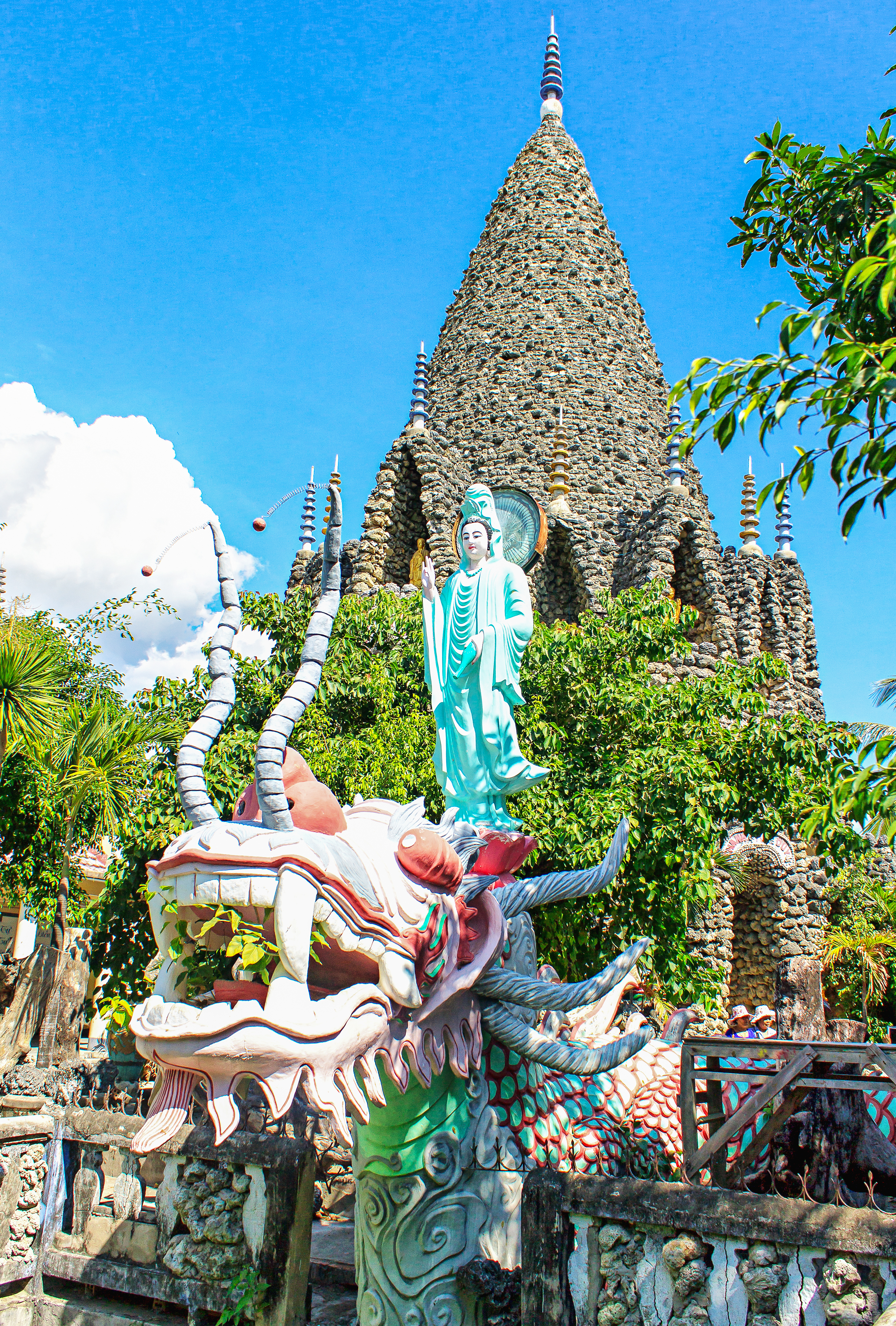 Tượng đài Quan Âm và tháp Bảo Tích ở chùa Từ Vân, TP Cam Ranh, tỉnh Khánh Hòa, Việt Nam..